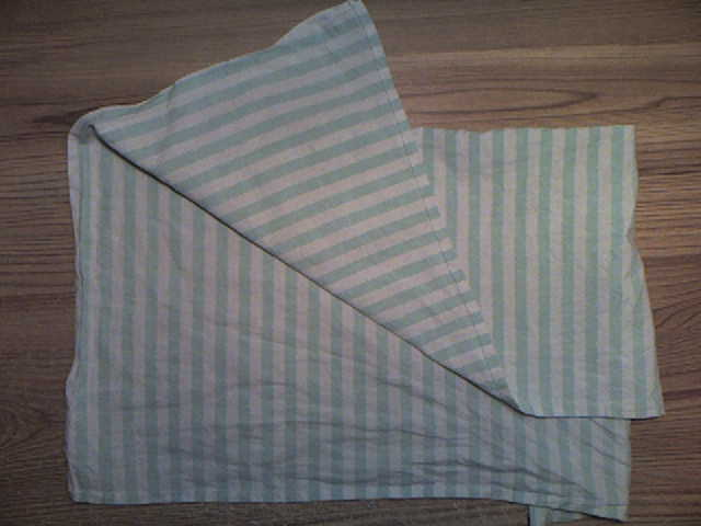 Photo d'un mouchoir rayé pour illustrer l'article Mouchoir. (Handkerchief)